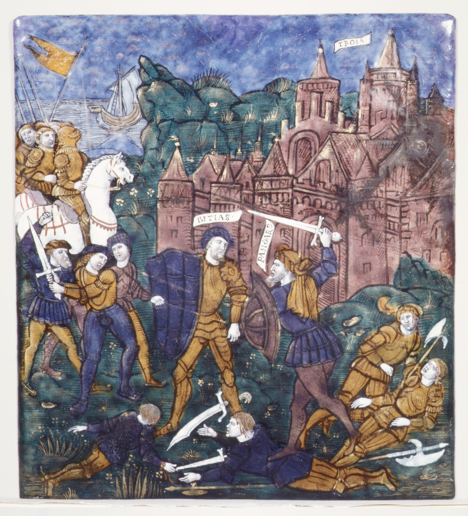 French, Limoges; Plaque; Enamels